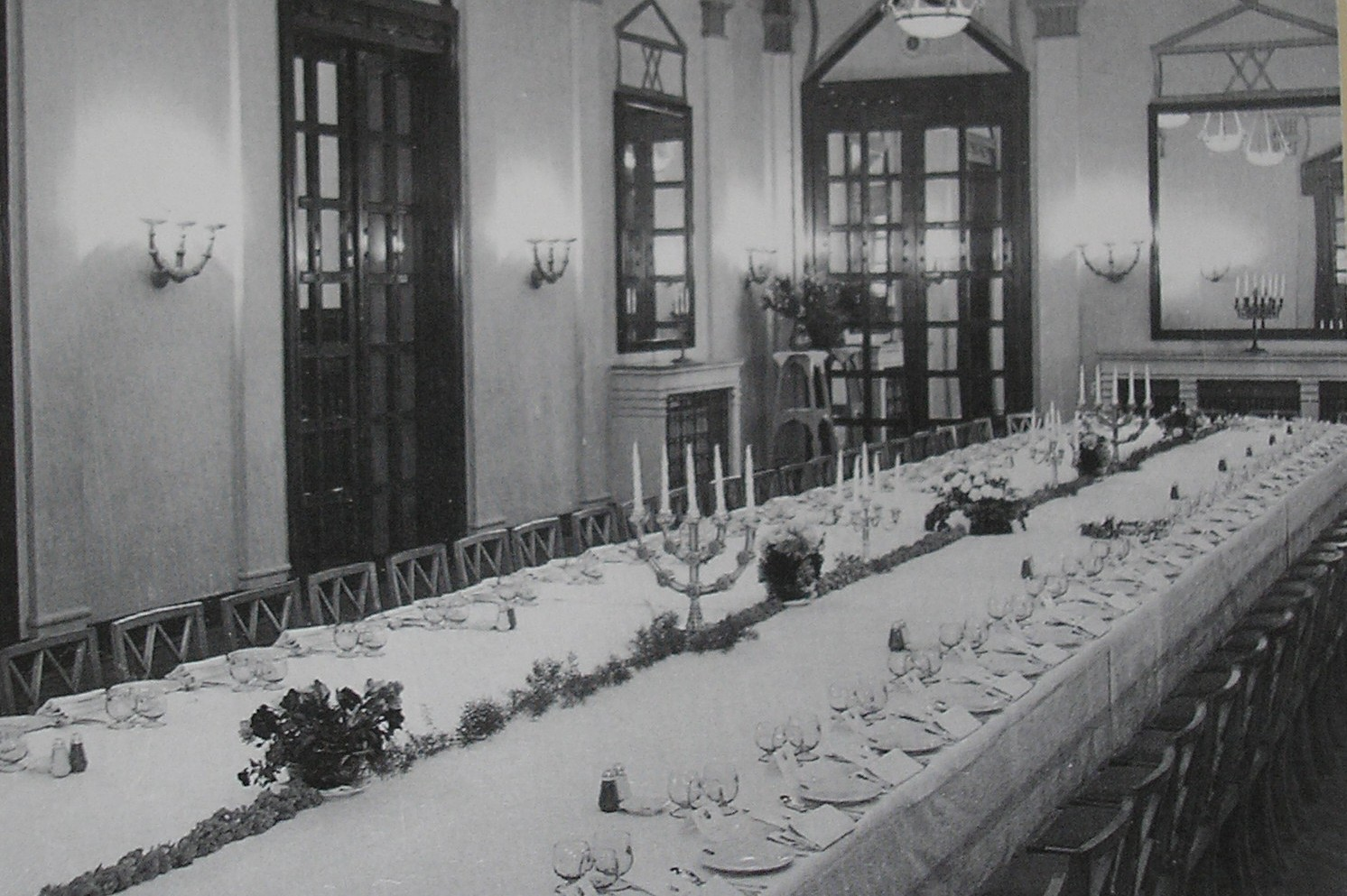 שולחן ערוך לארוחה ממלכתית בשנות ה-50 של המאה ה-20